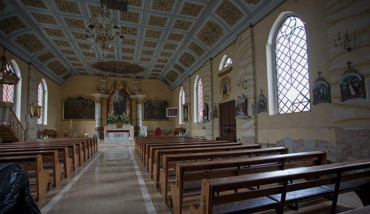 Miałam jedną minutę na sfocenie wnętrza, przypadek sprawił, że uchylono zamknięte z powodu małego remontu, drzwi.